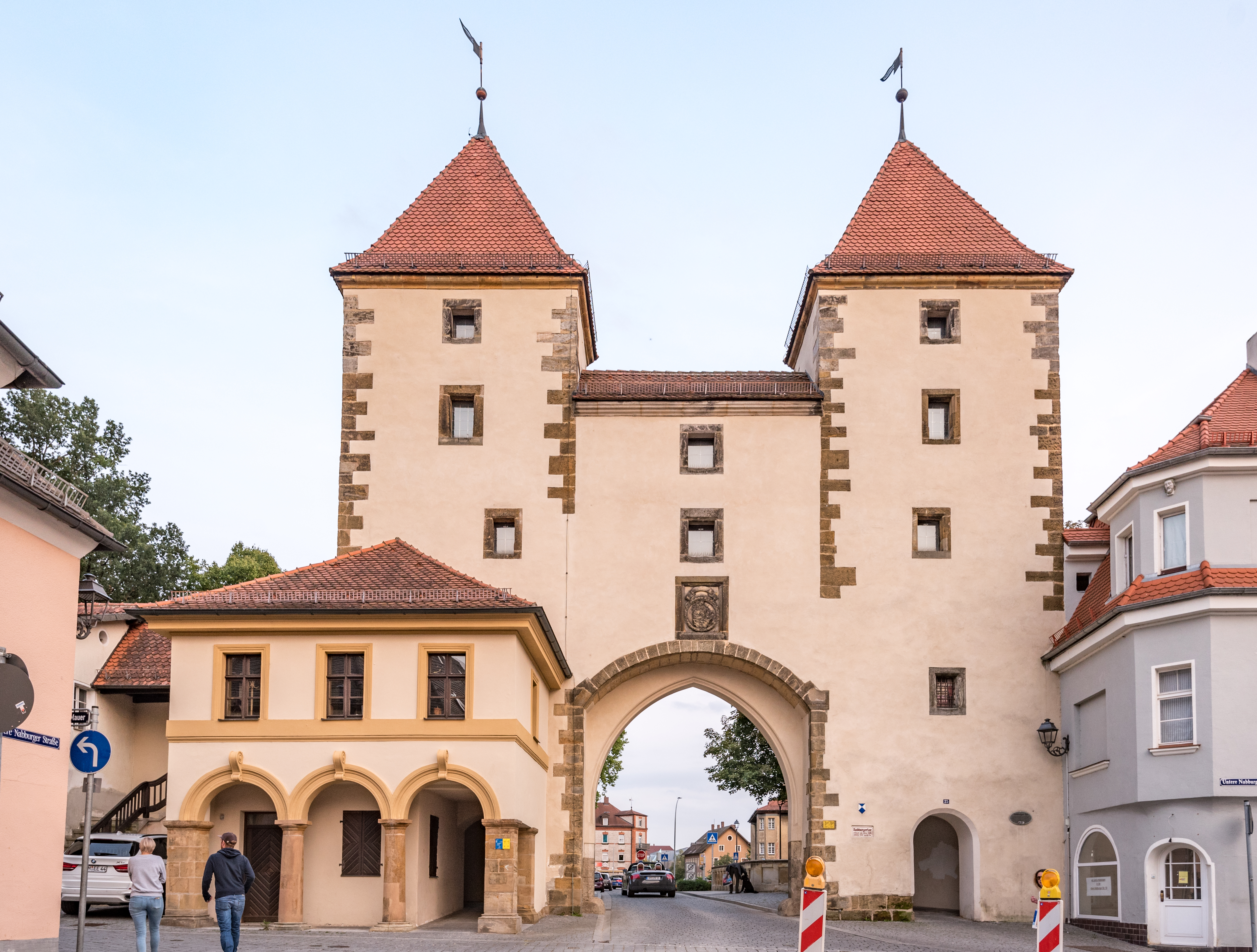 Amberg, Stadtbefestigung, Hinter der Mauer 25, Nabburger Tor